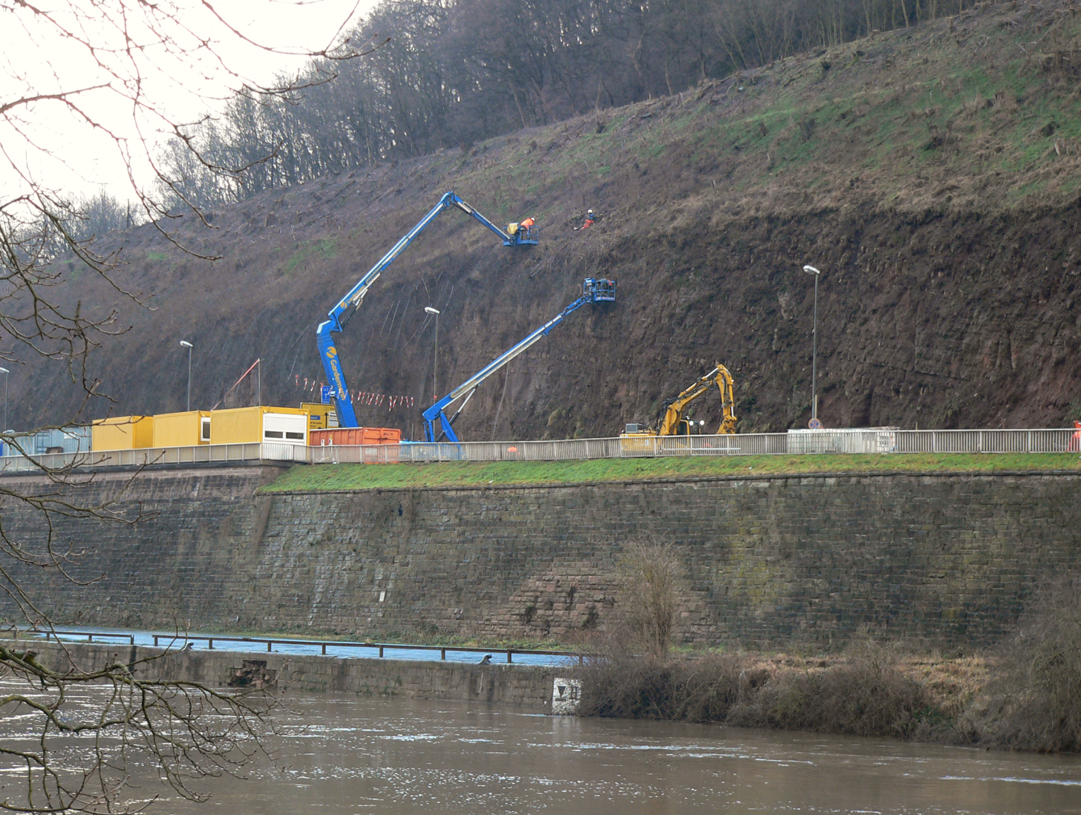 Hangsicherung am Questenberg